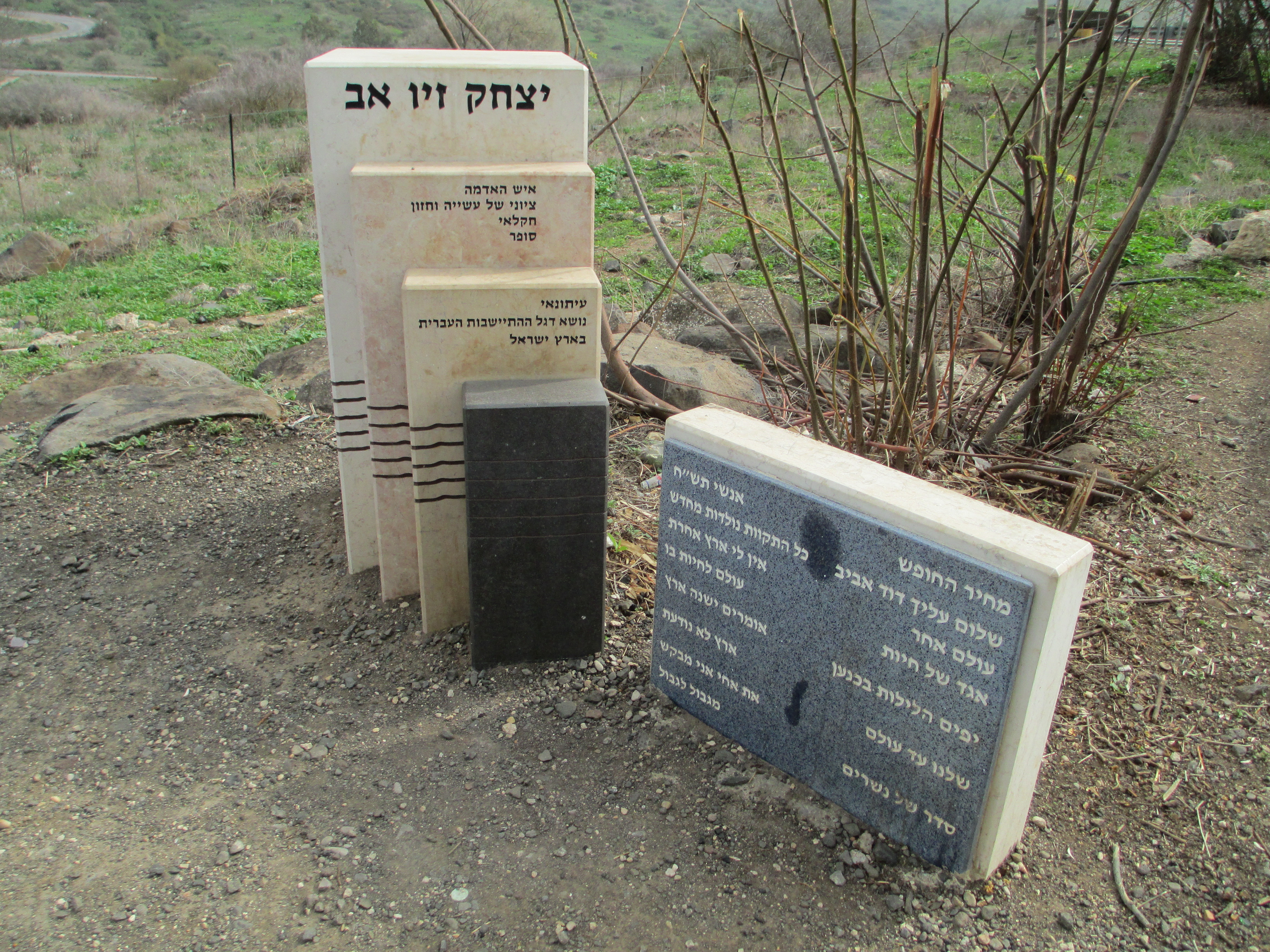 אתר זיכרון ליצחק זיו-אב במתחם המושבה משמר הירדן